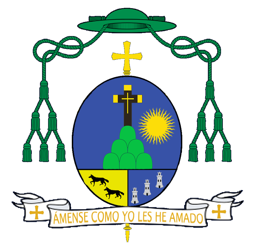 escudo Mons. Silvano Pedroso